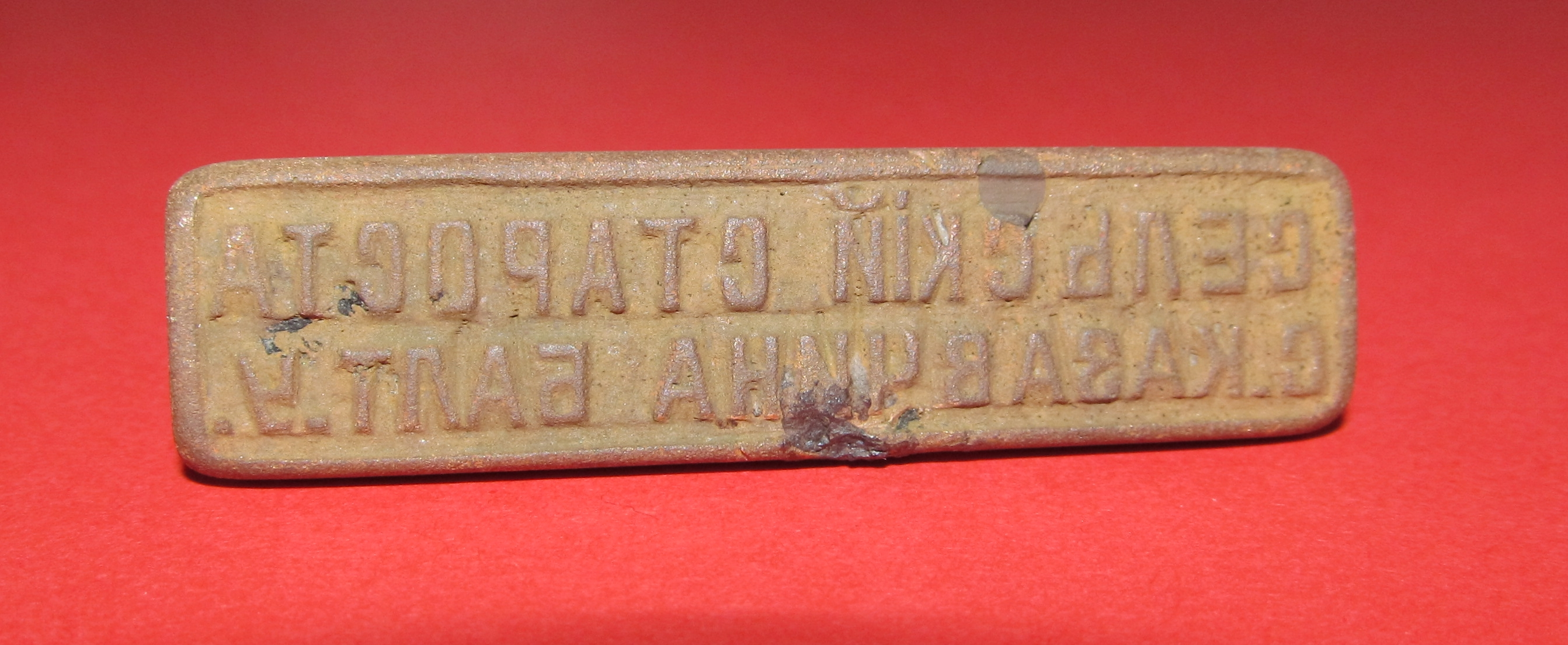 Старовинна печатка сільського старости села Казавчин.